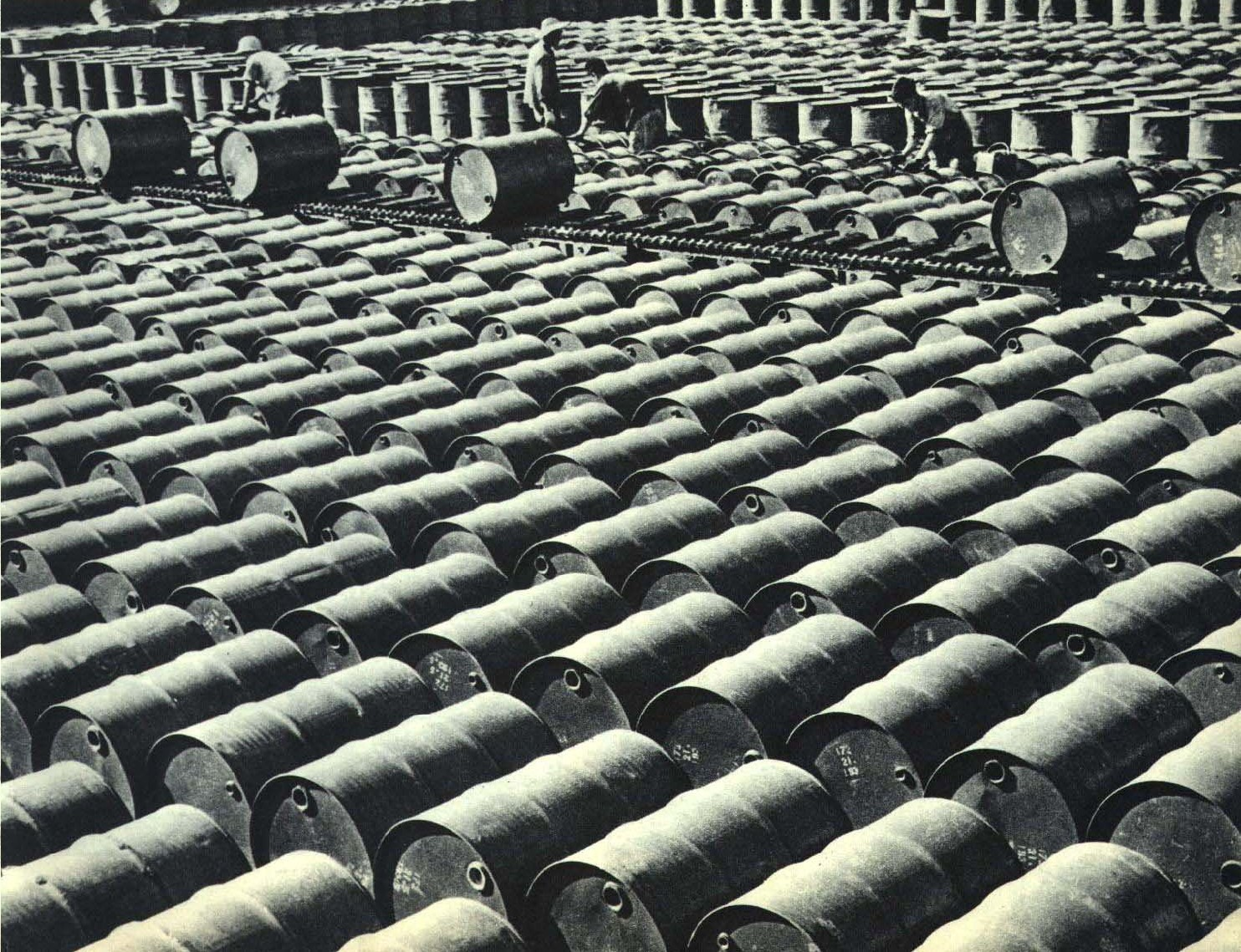 1963-03 1963年 上海炼油厂